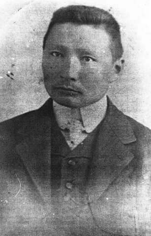 Ксенофонтов Павел Васильевич